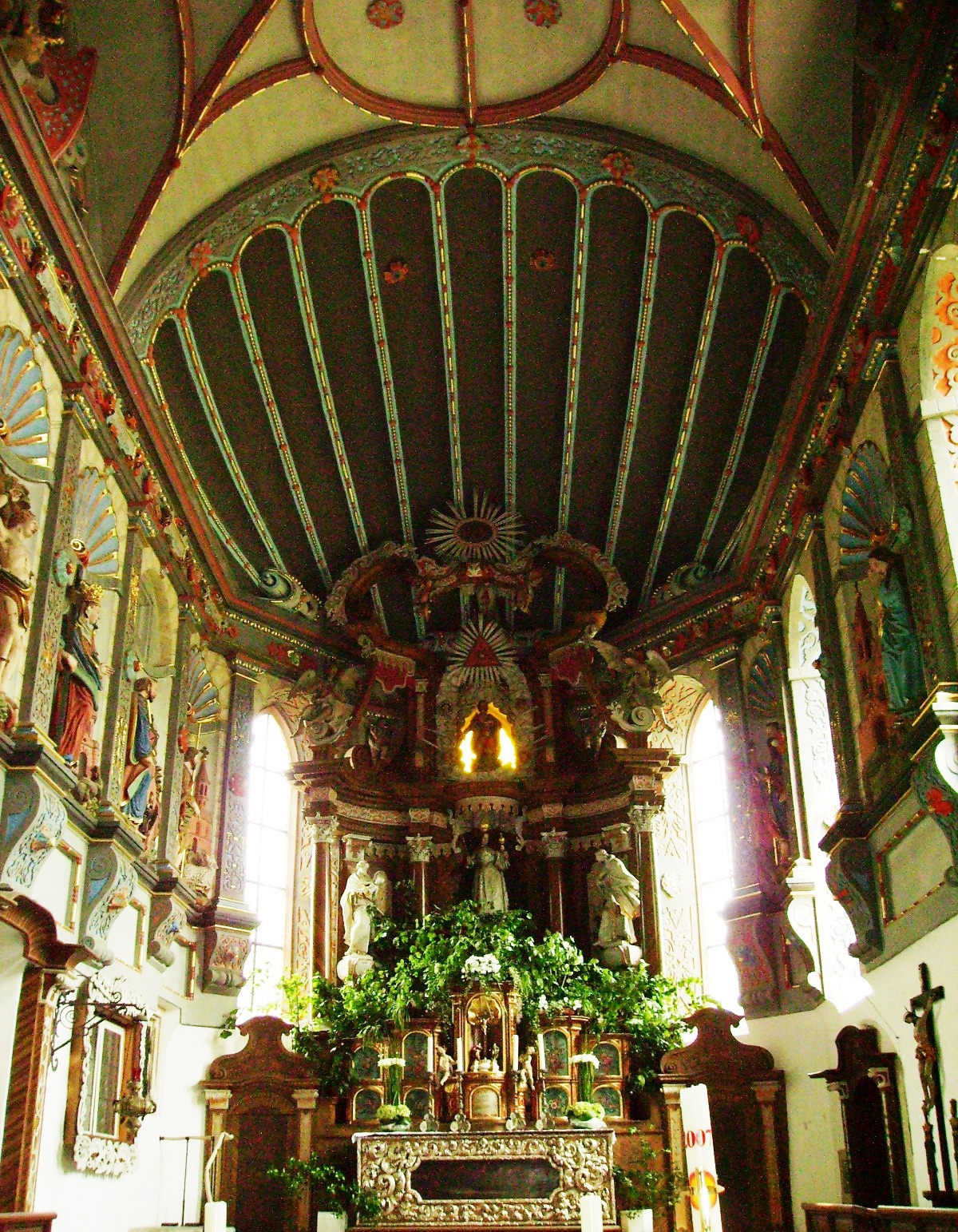 Hechingen, Germany